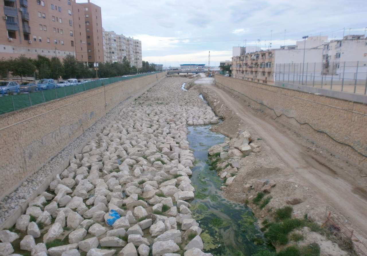 Desembocadura de la Rambla de las Ovejas, conocida también como Barranco de las Ovejas, en el barrio de San Gabriel, Alicante, España.